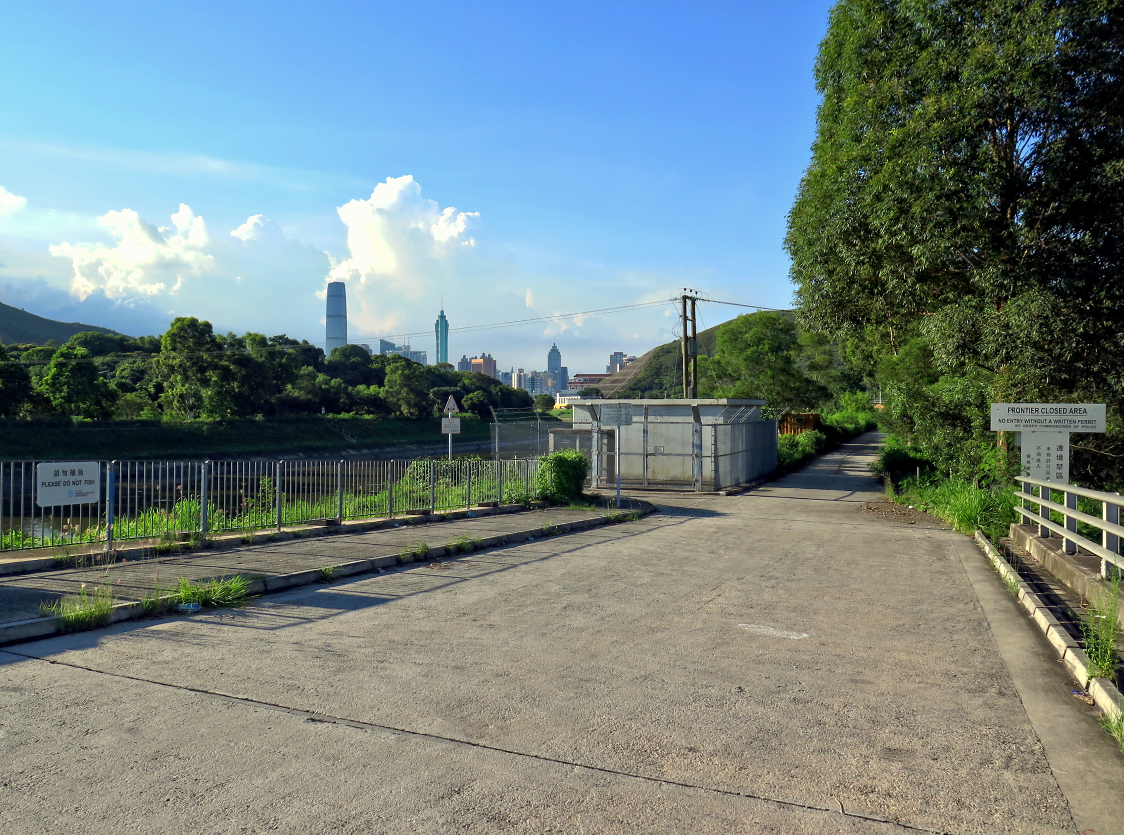 Lo Wu Frontier Area Sign